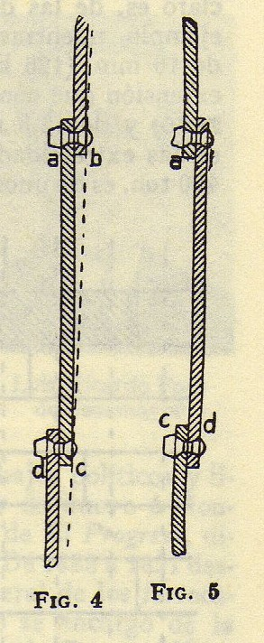 Unión de planchas de una misma traca del forro de un barco, a tingladillo (Fig. 4) y a doble tingladillo (Fig. 5)